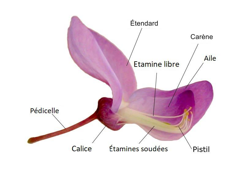 Termes français des parties d'une fleur de Faboideae (Wisteria sinensis)